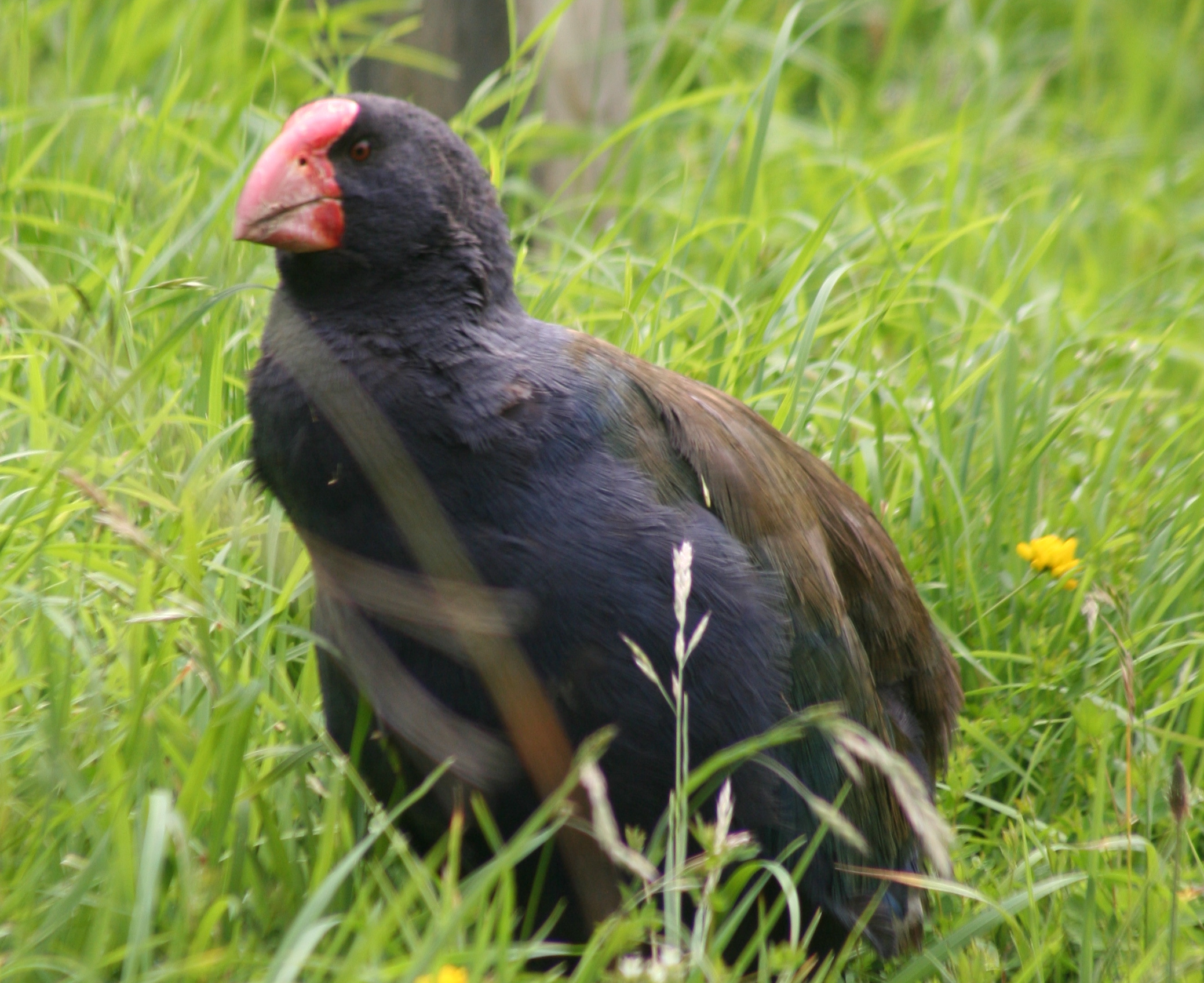 Porphyrio hochstetteri Kapiti Island